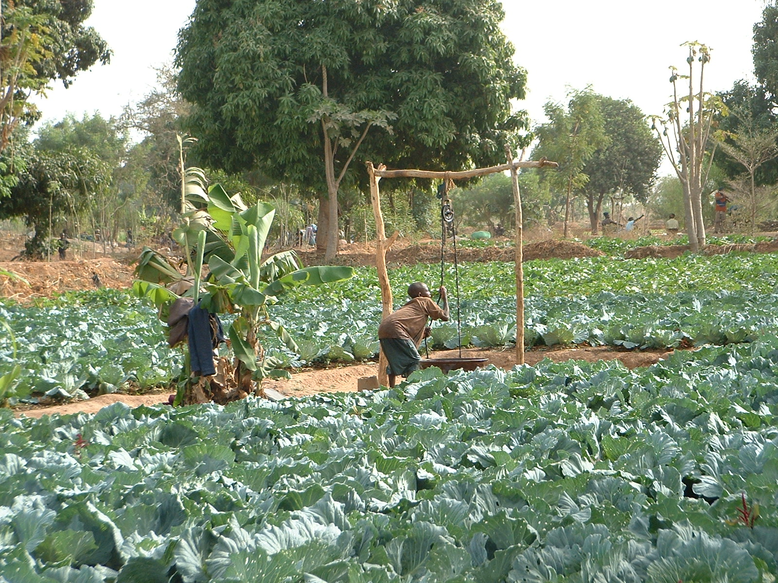 Choux et puits d'irrigation - environs de Bobo Dioulasso